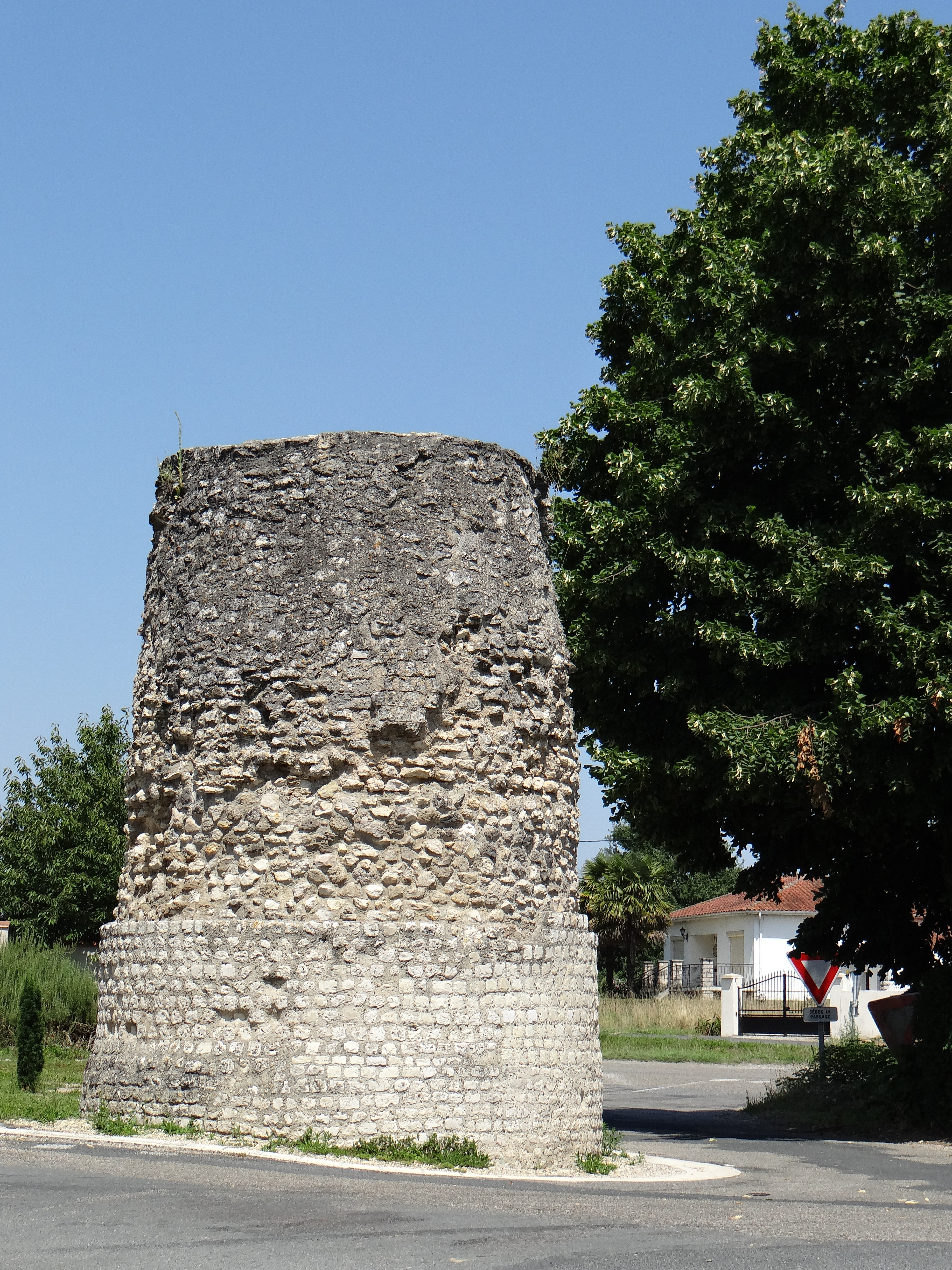 Aiguillon - Tour de Tourasse, avenue du 11-novembre-1918